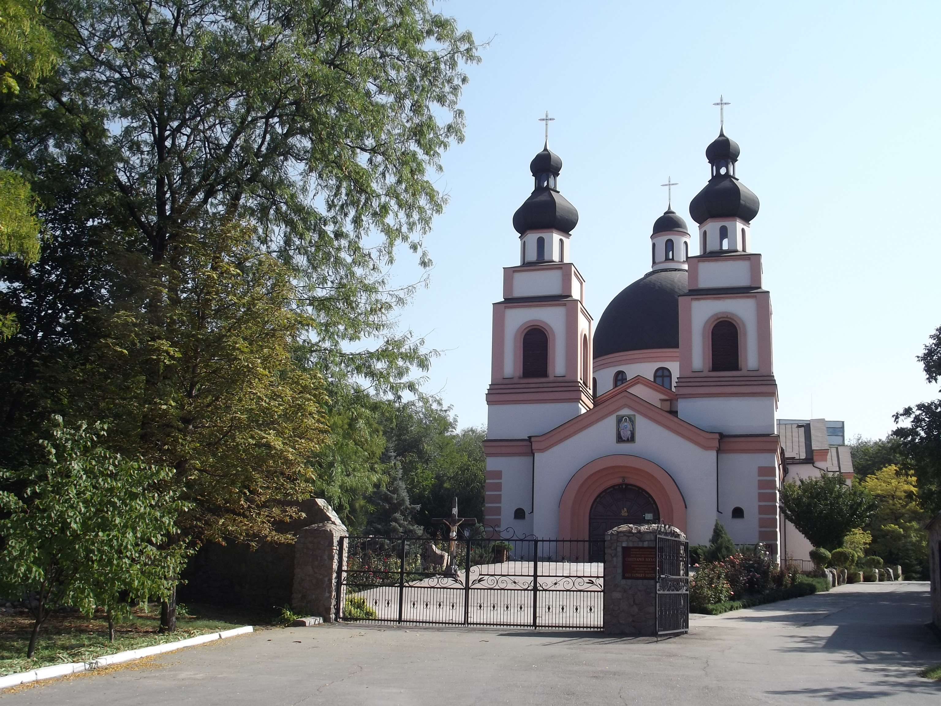 Храм Бога Отца Милосердного